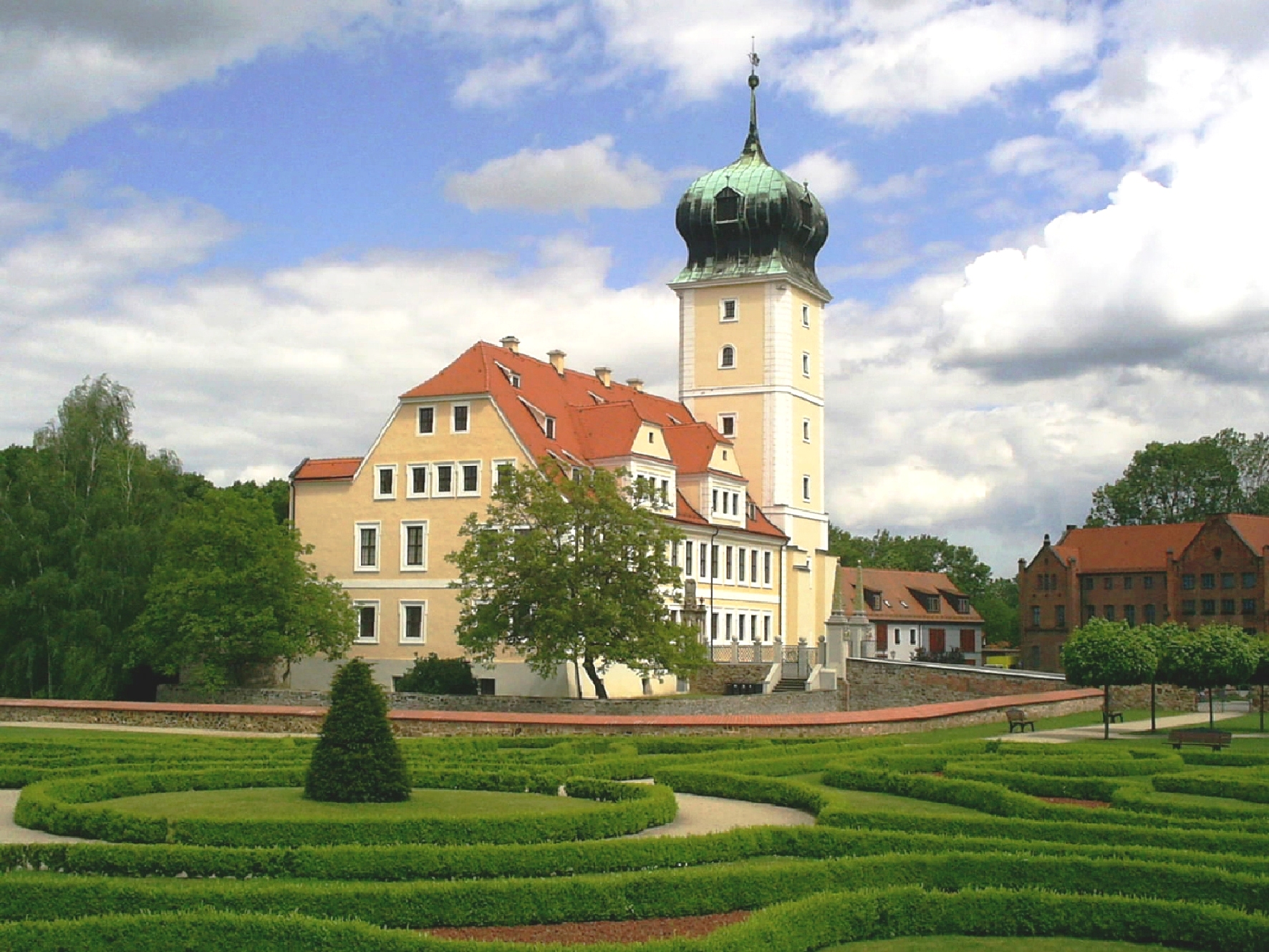 Barockschloss und Barockgarten in Delitzsch